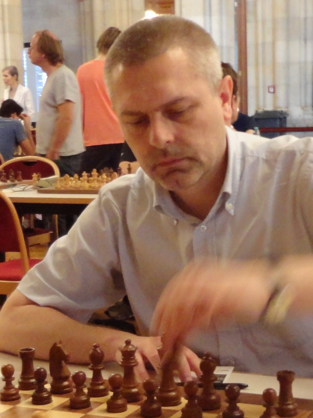 Nikolaus Stanec, Vienna Chess Open 2015 in Wien.